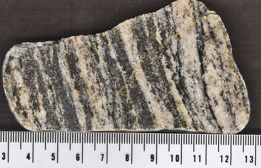 Bändergneis (Strandgeröll vom Ufer des Baikalsees).